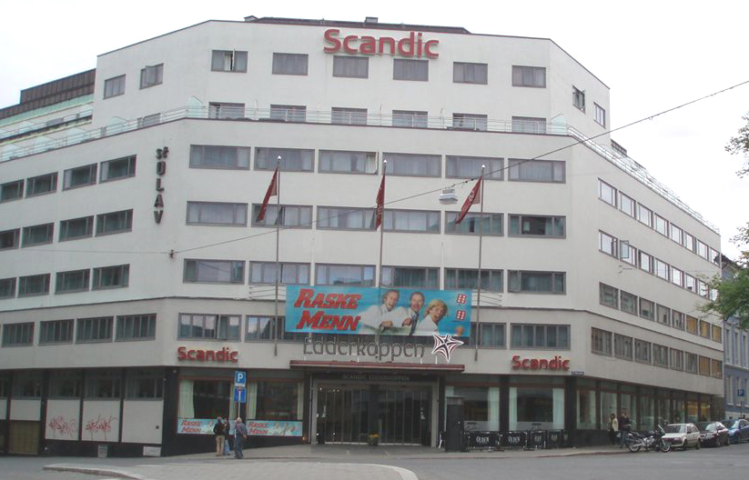 Edderkoppen theater in Oslo.